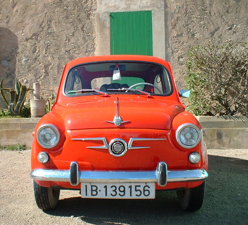 Seat 600, Mallorca, Spain